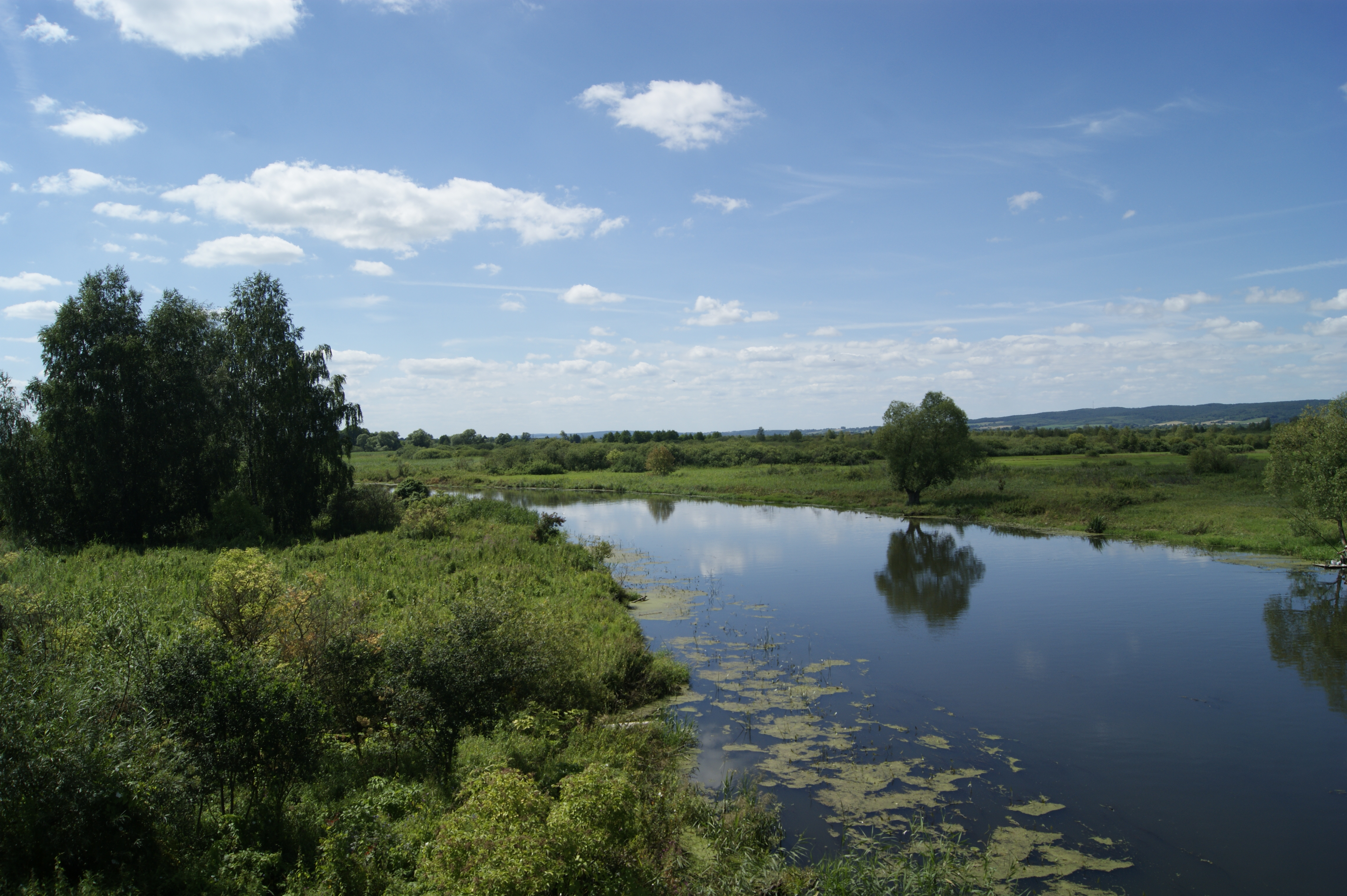 Noteć